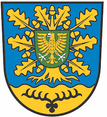 Die Gemeinde Eixen führt seit 2017 ein eigenes Wappen